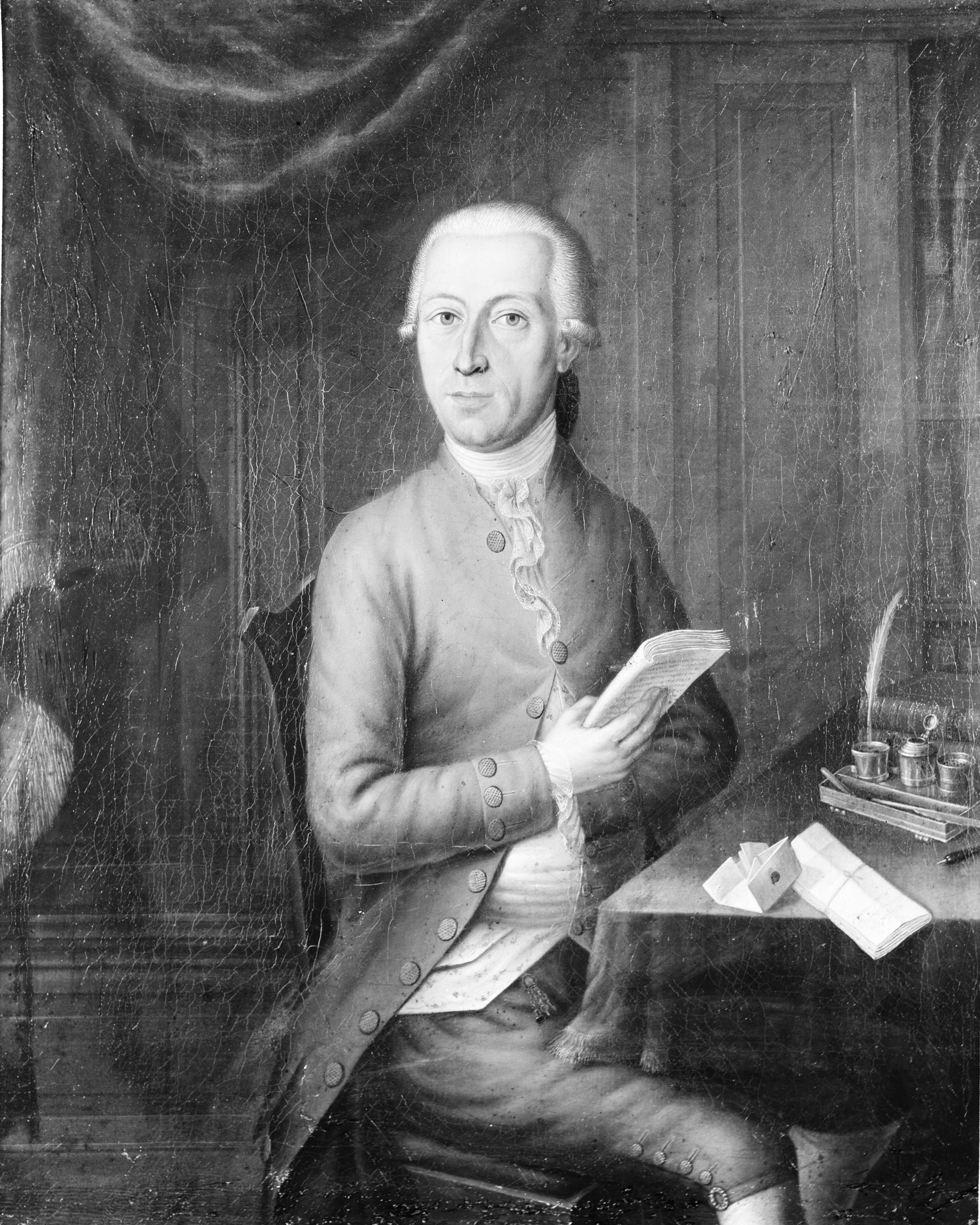 Portrait of Hendrik Willem Rappard (1748-1833)